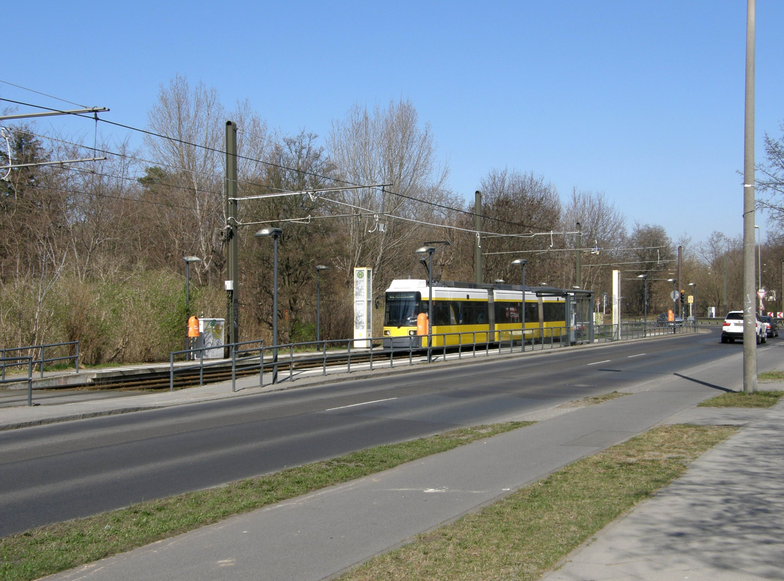 Berlin-Mahlsdorf, Hultschiner Damm